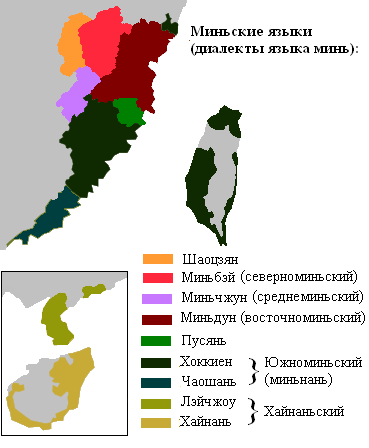 Миньские языки (диалекты языка минь)